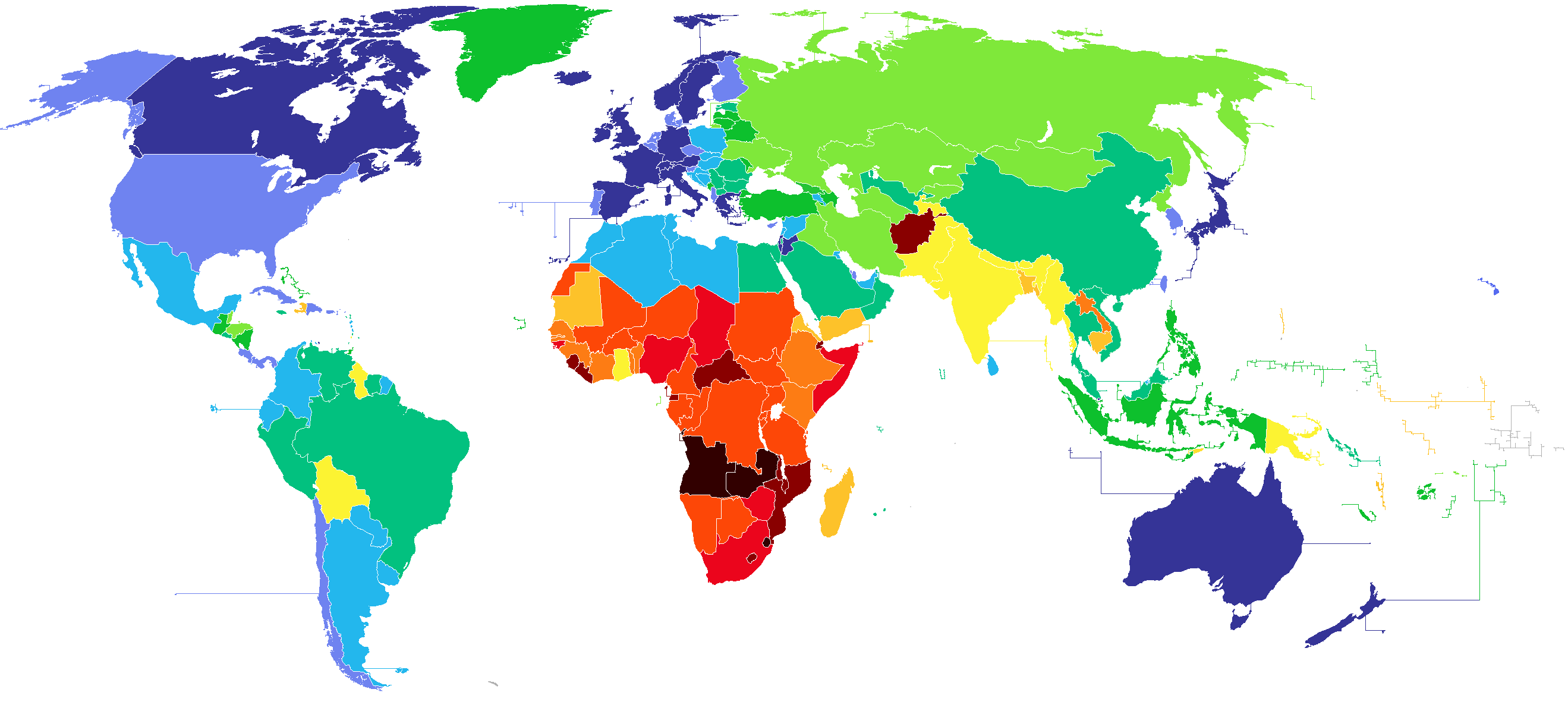 Esperanza de vida 2013